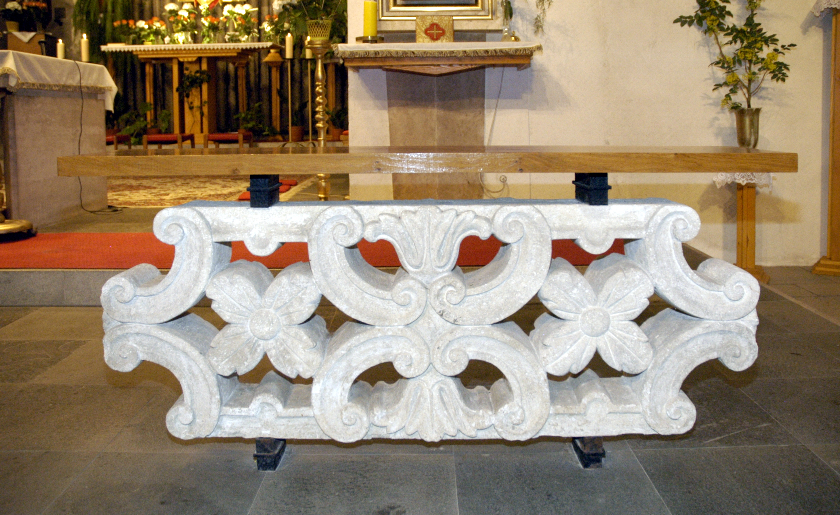 Kommunionbank in der römisch-katholischen Pfarrkirche Mariä Geburt in Roseldorf. Gemeinde Sitzendorf an der Schmida